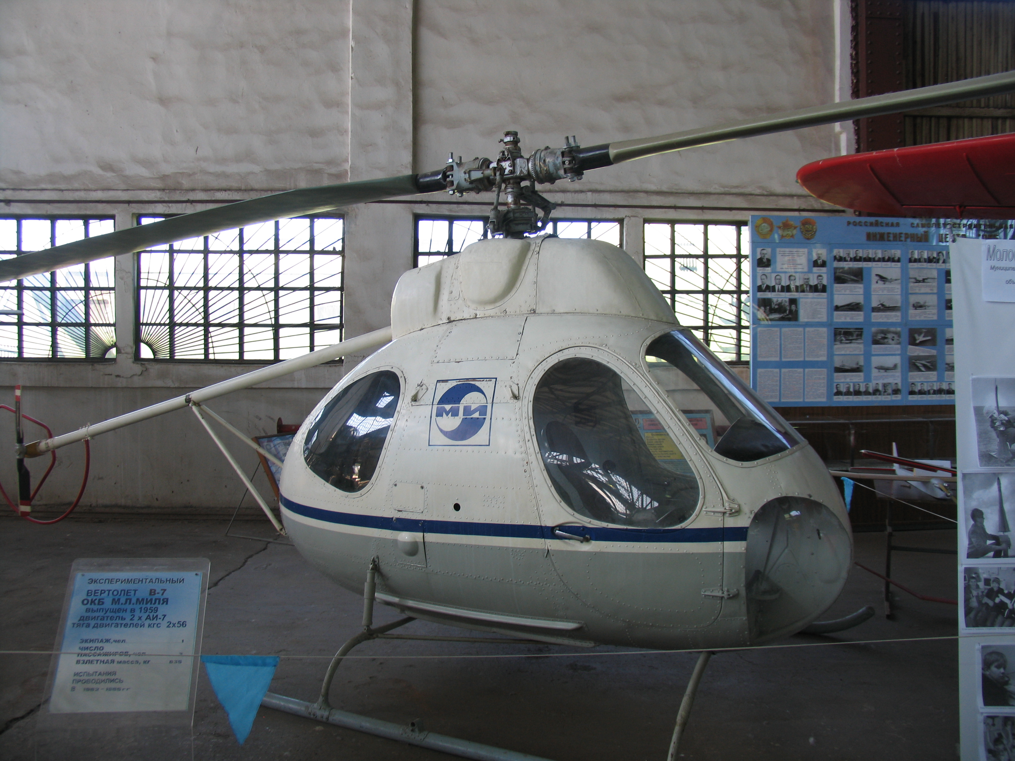 Опытный вертолёт В-7.